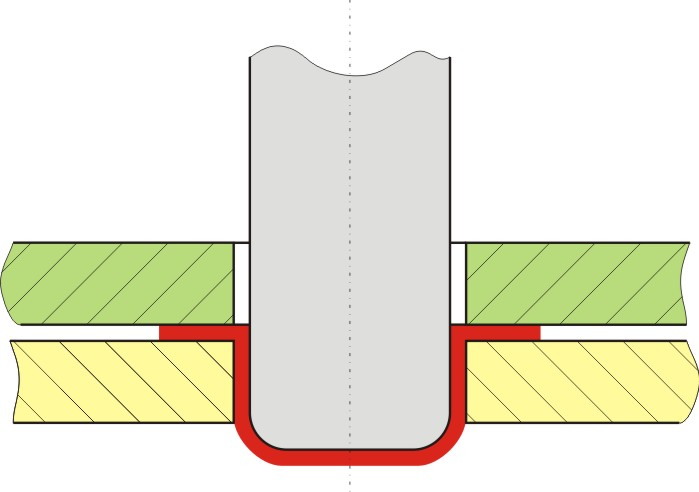 hlboke tahanie